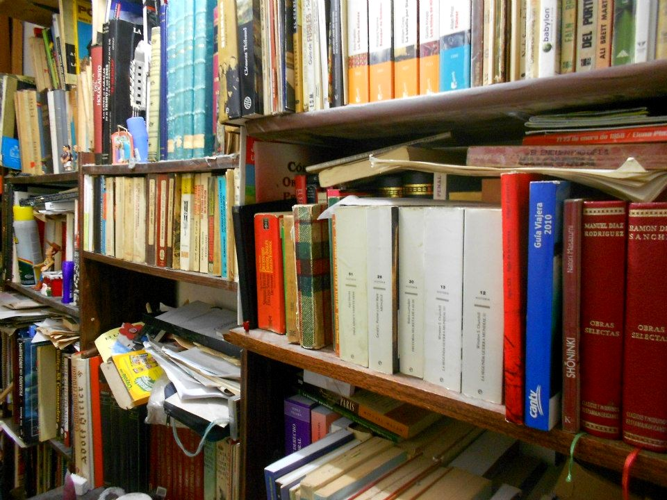 Libros varios.